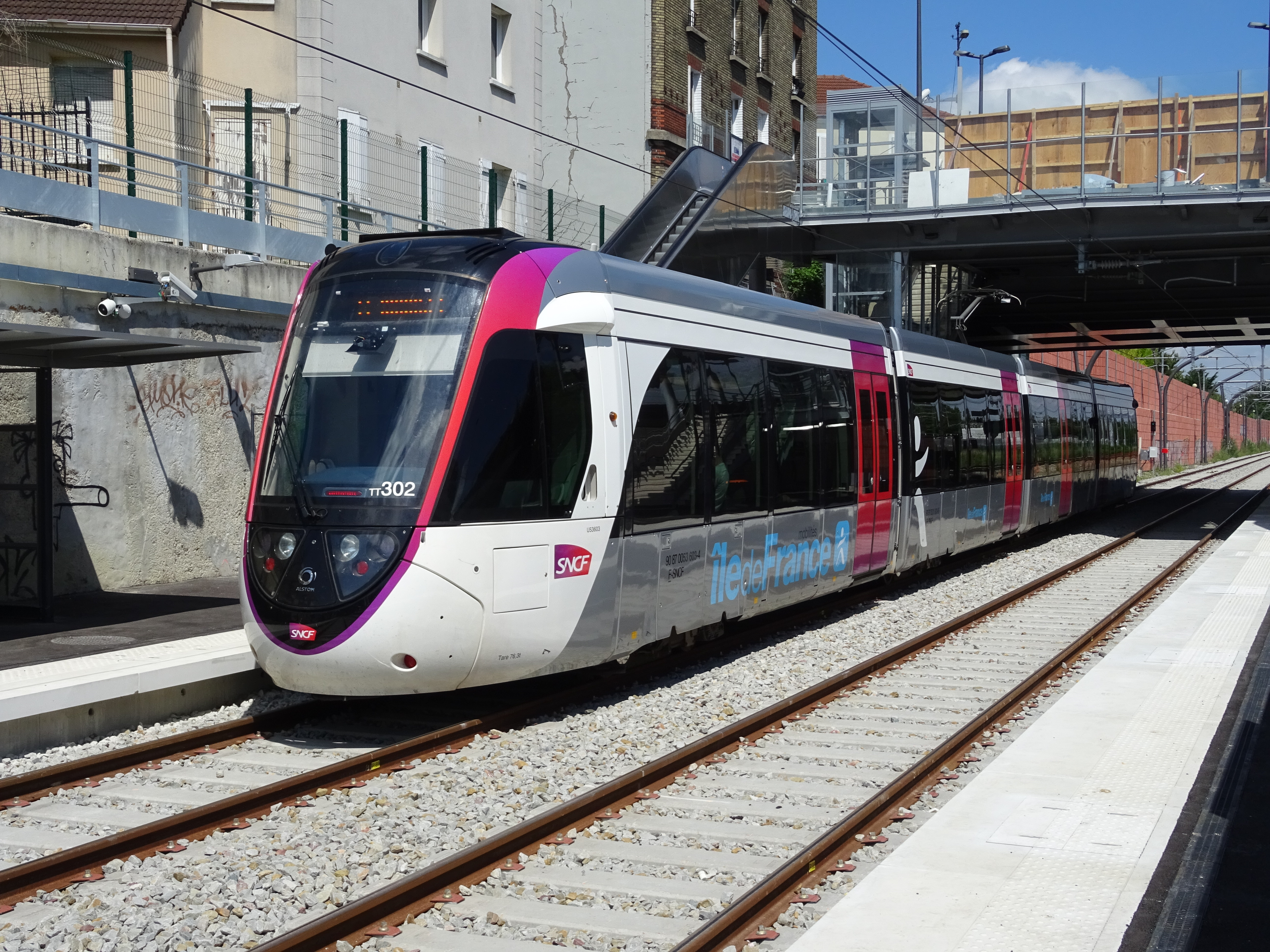 U 53600 à quai à Epinay-Villetaneuse (Montmagny) direction Le Bourget.